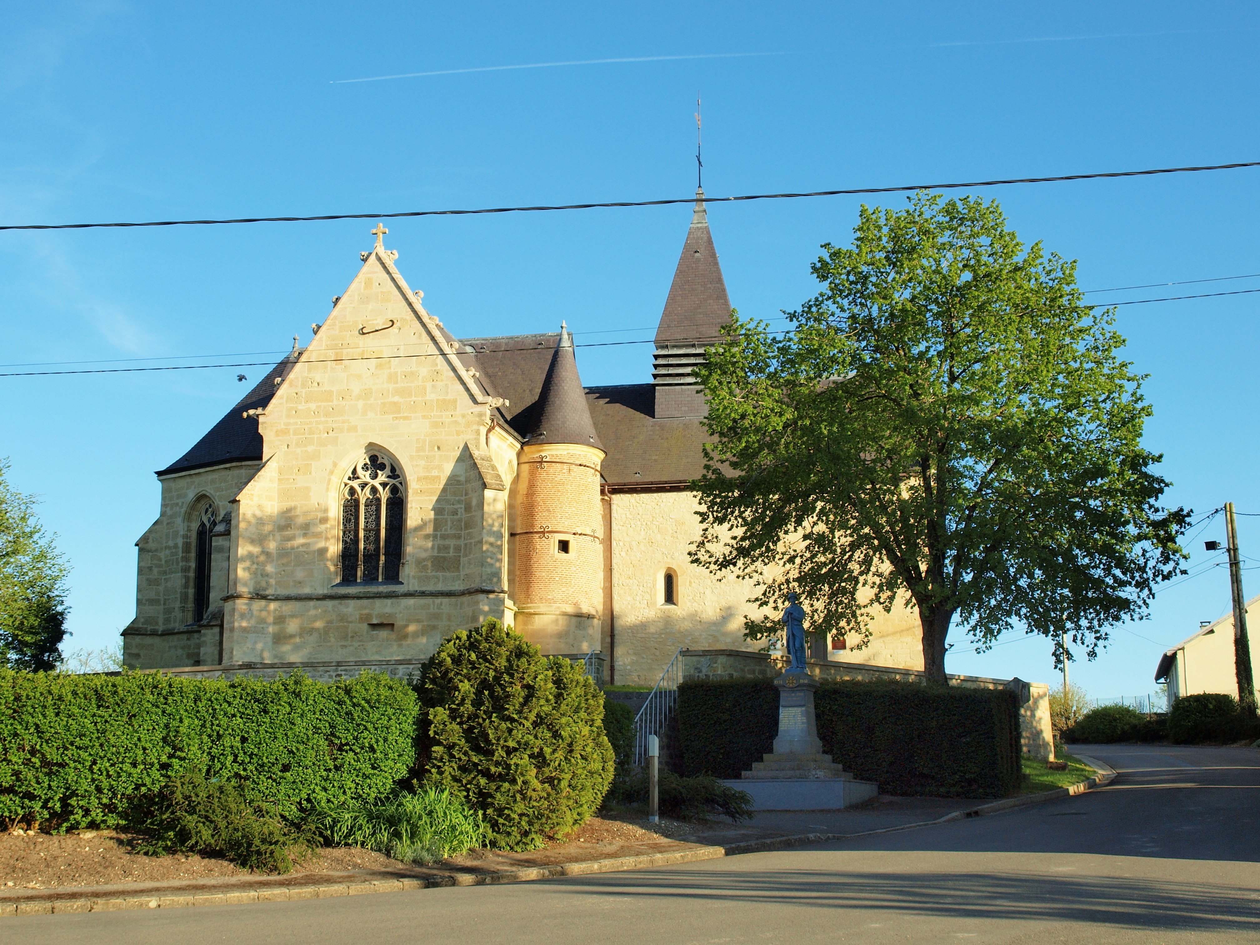 Église Saint-Waast de Rilly-sur-Aisne (Ardennes, France)